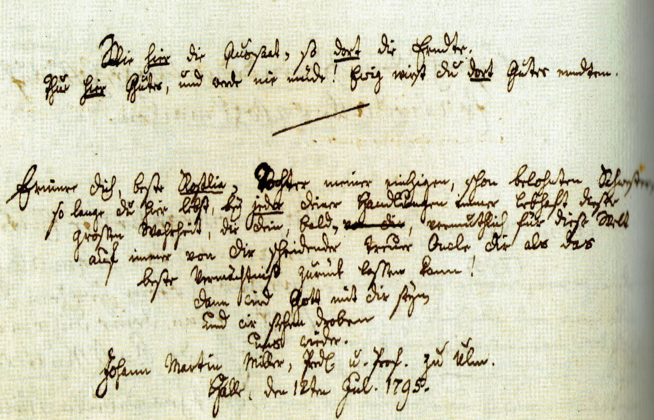 Eintrag Johann Martin Millers im Stammbuch der Louise Mündler